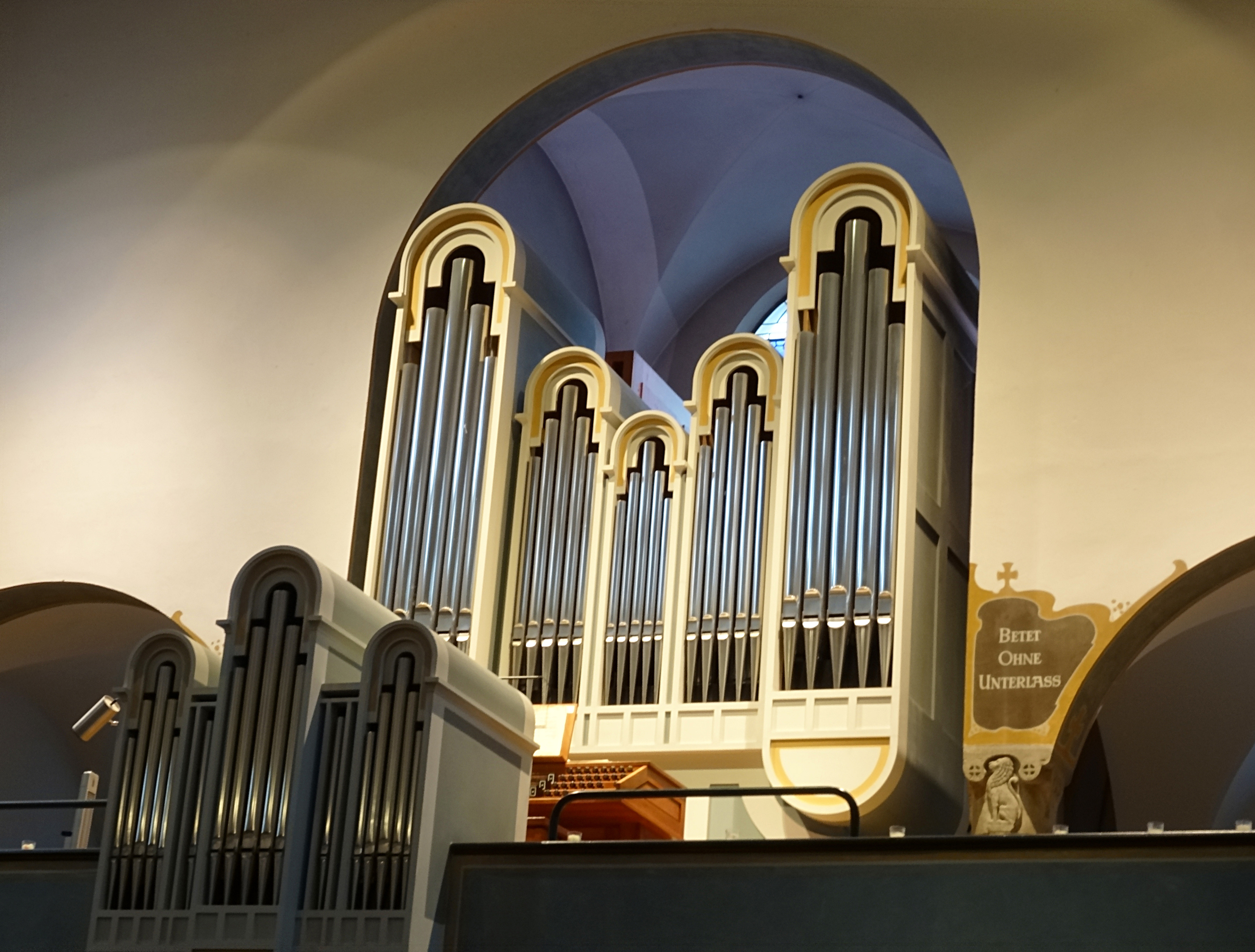 Rieger-Orgel (1990) auf der Westempore der Erlöserkirche